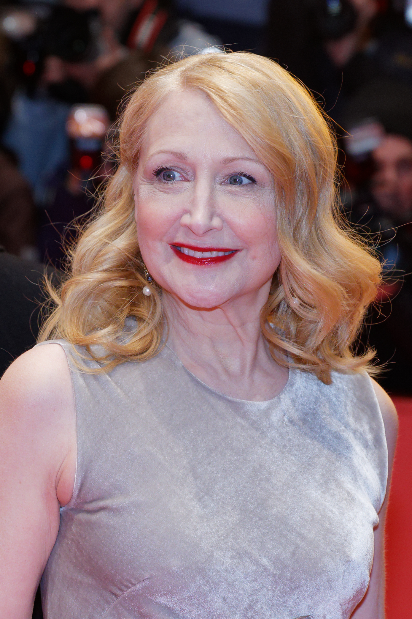 Patricia Clarkson bei der Weltpremiere von The Party im Rahmen der Berlinale 2017